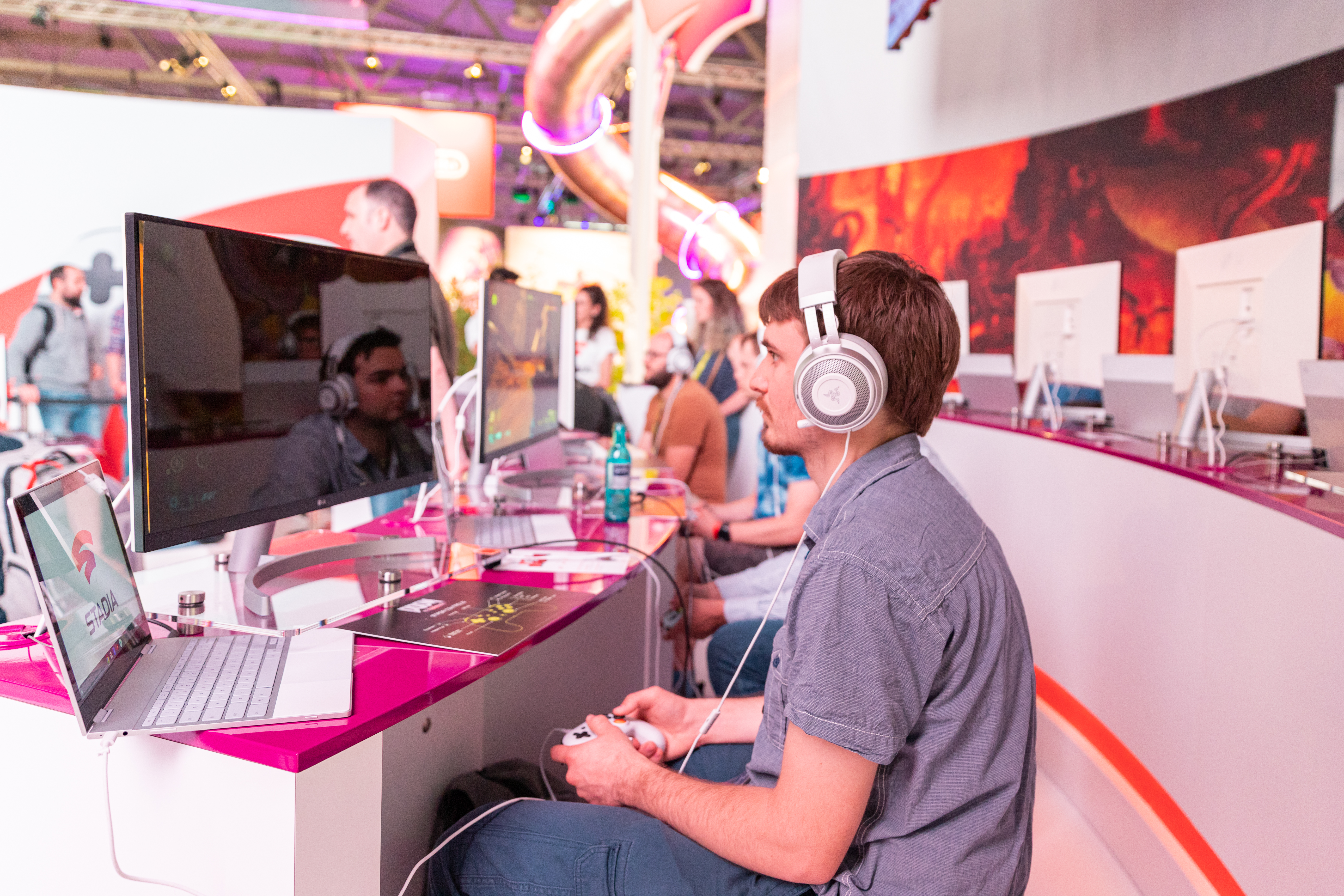 Google Stadia Cloud-gaming